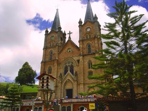 Imponente frontis del templo parroquial de Belmira